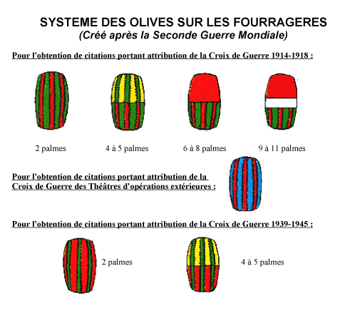 olives portées sur les fourragères dans l'armée française